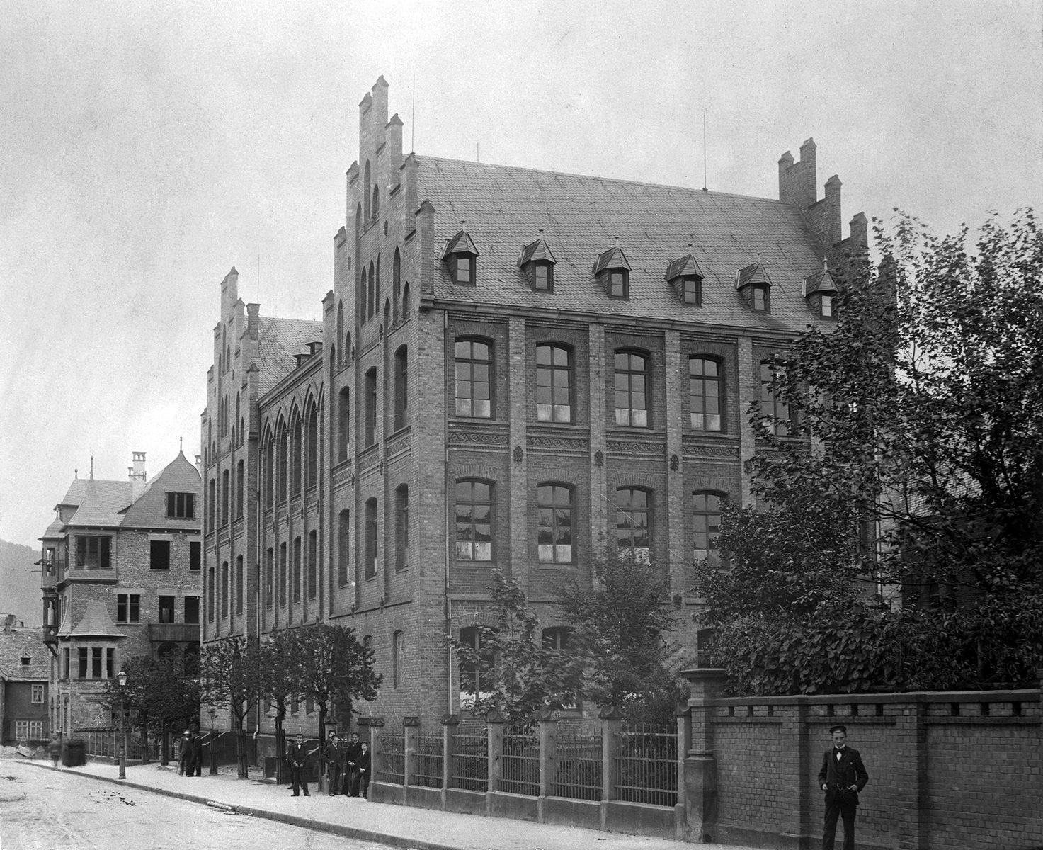 Gebäude der "Höheren Töchterschule" (eröffnet 1879) in der Universitätsstraße 6 in Marburg. Es wurde nach 1960 durch das juristische Institut der Universität (Savigny-Haus) ersetzt. Im Hintergrund der Neubau Universitätsstraße 4 (1897/98). Ansicht von Westen.